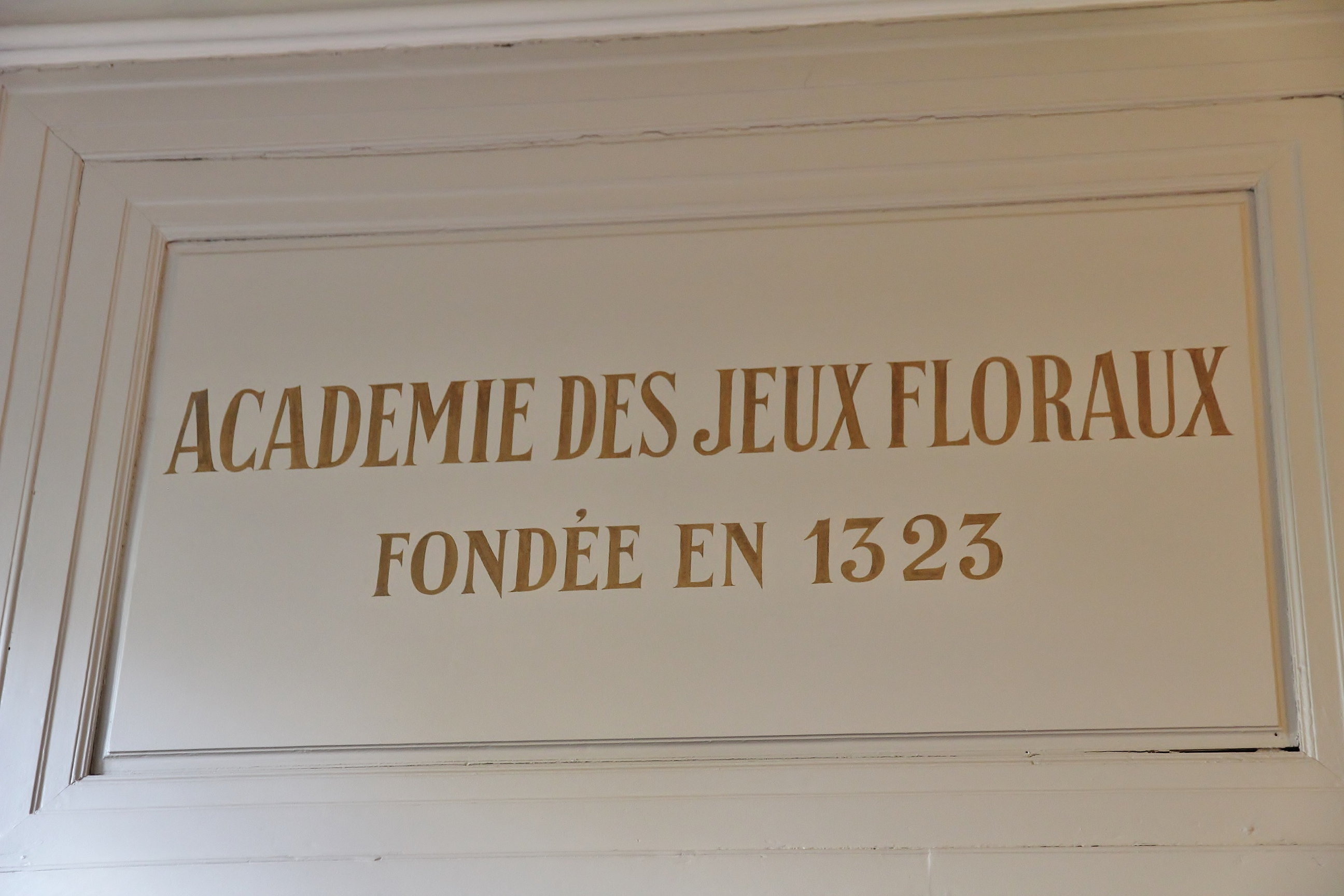 Entrée de l'Académie des Jeux floraux à l'hôtel d'Assézat, Toulouse.